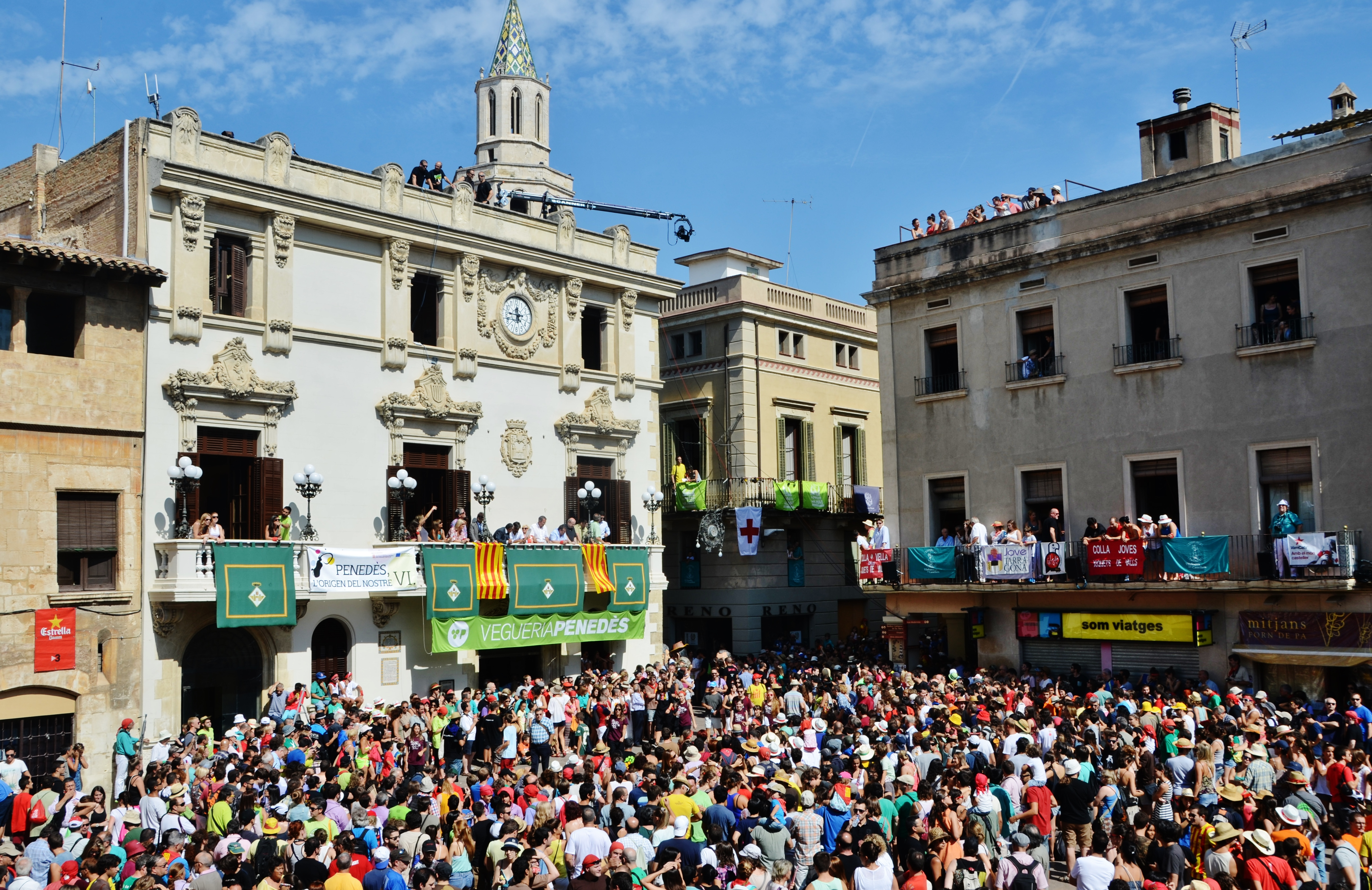 Ajuntament de Vilafranca del Penedès, 30-8-14